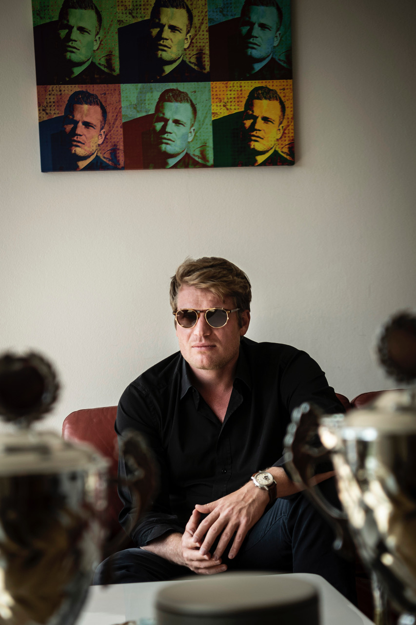 Autor: Marek Musil